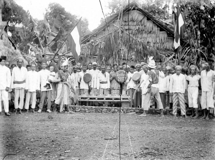 Negatief. Op een trom op de foto staat de volgende tekst: 'Baileoe Kaitetoe 8-10-20'.. Groepsportret van Ambonezen met muziekinstrumenten